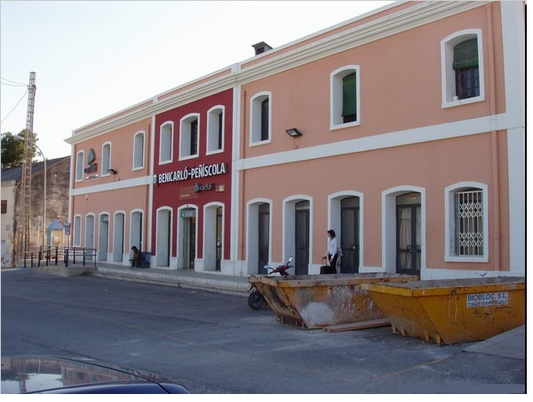 Estación adif de Benicarló-Peñíscola